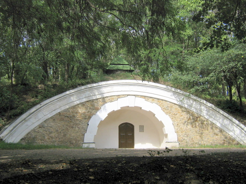 Pushkіnskiy grotto